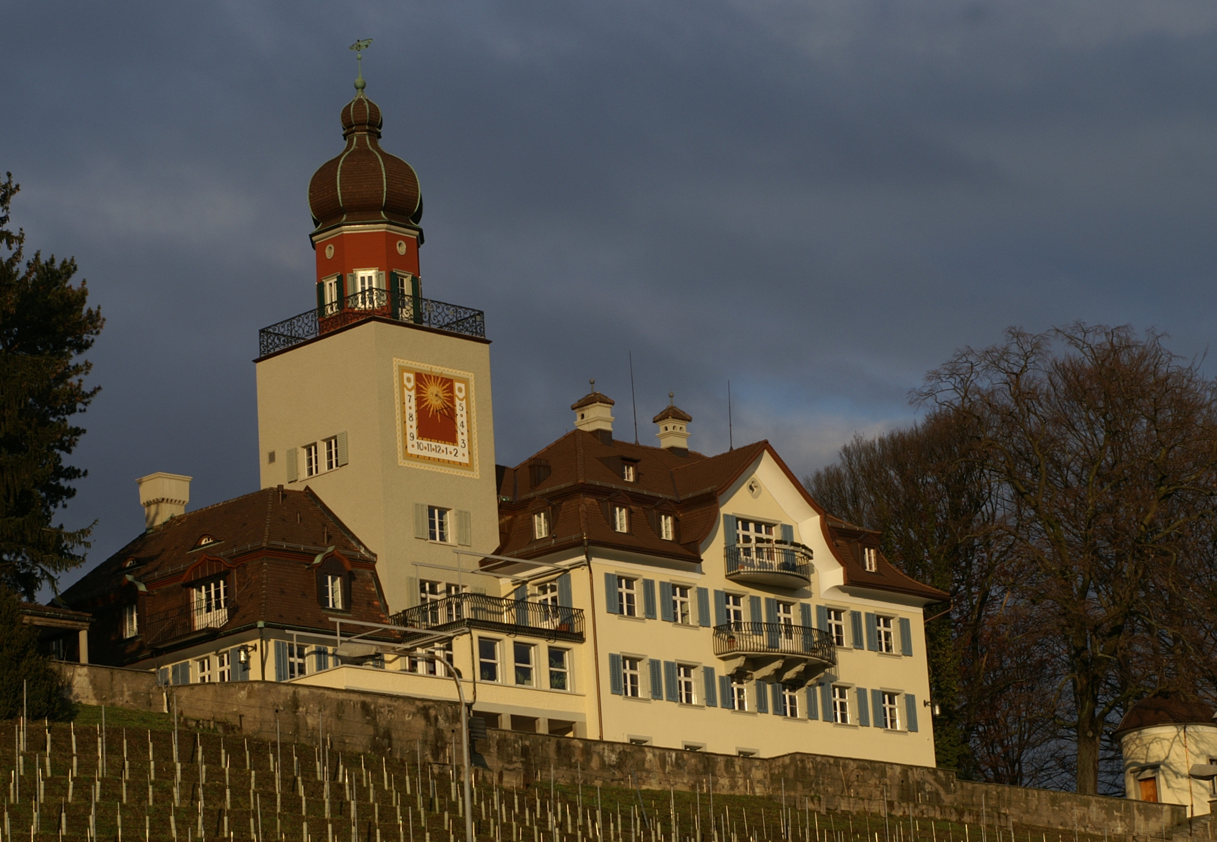 Das Schloss Heerbrugg in CH-9436 Balgach, gilt zweifellos als Ursprung von Heerbrugg. Anscheinend bestand bereits zu Römerzeiten ein Kastell, auf deren Grundmauern im Jahre 1077 die Feste "Herburch" erbaut wurde, welche aber später abbrannte. Das bestehende Schloss ohne Turm stammt etwa aus dem Jahre 1775. Bis 1796 bestand Heerbrugg lediglich aus dem Schloss mit drei Häusern. Die Ebene war gänzlich unbewohnt. Quelle: [1] Die Geschichte vom Schloss Heerbrugg ist auch verknüpft mit der Geschichte der Unternehmerdynastie Schmidheiny. Die Geschichte der erfolgreichen Familie beginnt mit dem Kauf des Schlosses durch Jacob Schmidheiny I. im Jahre 1867. Bis zum 31.12.2004 war das Schloss im Besitze der Familie Schmidheiny.